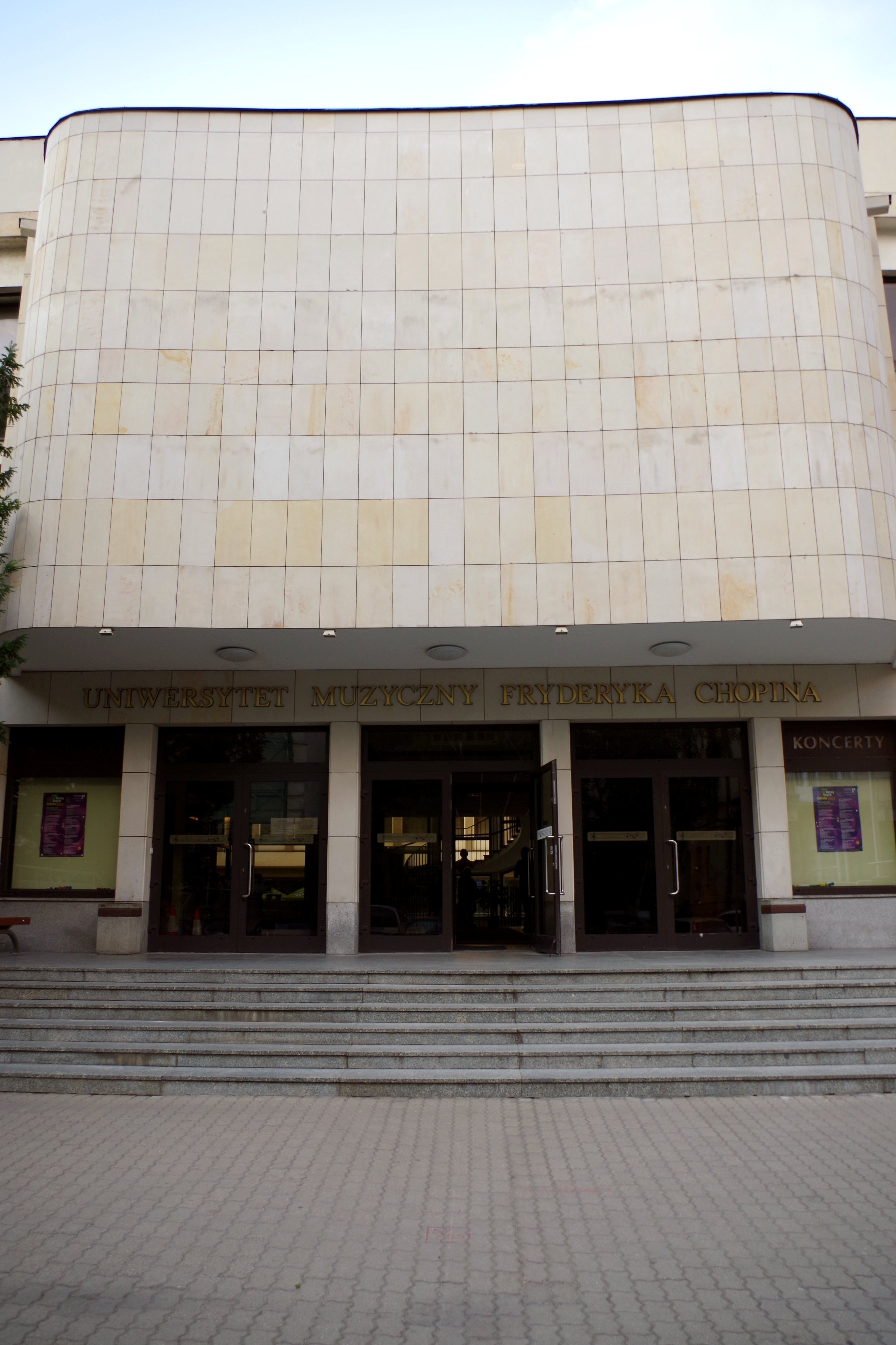 Uniwersytet Muzyczny Fryderyka Chopina w Warszawie